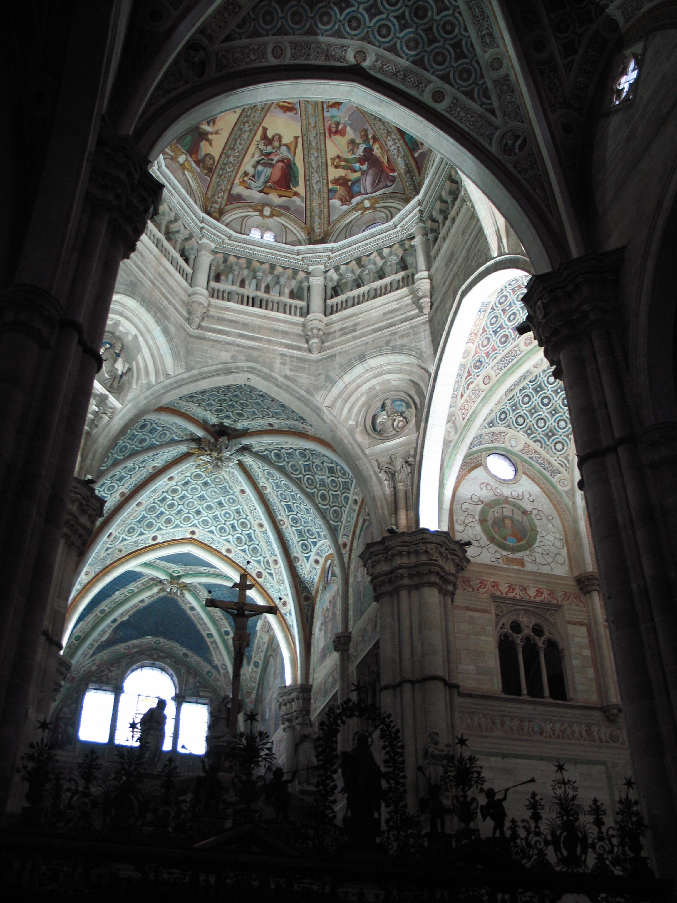 Certosa di Pavia, Lombardia, Italia